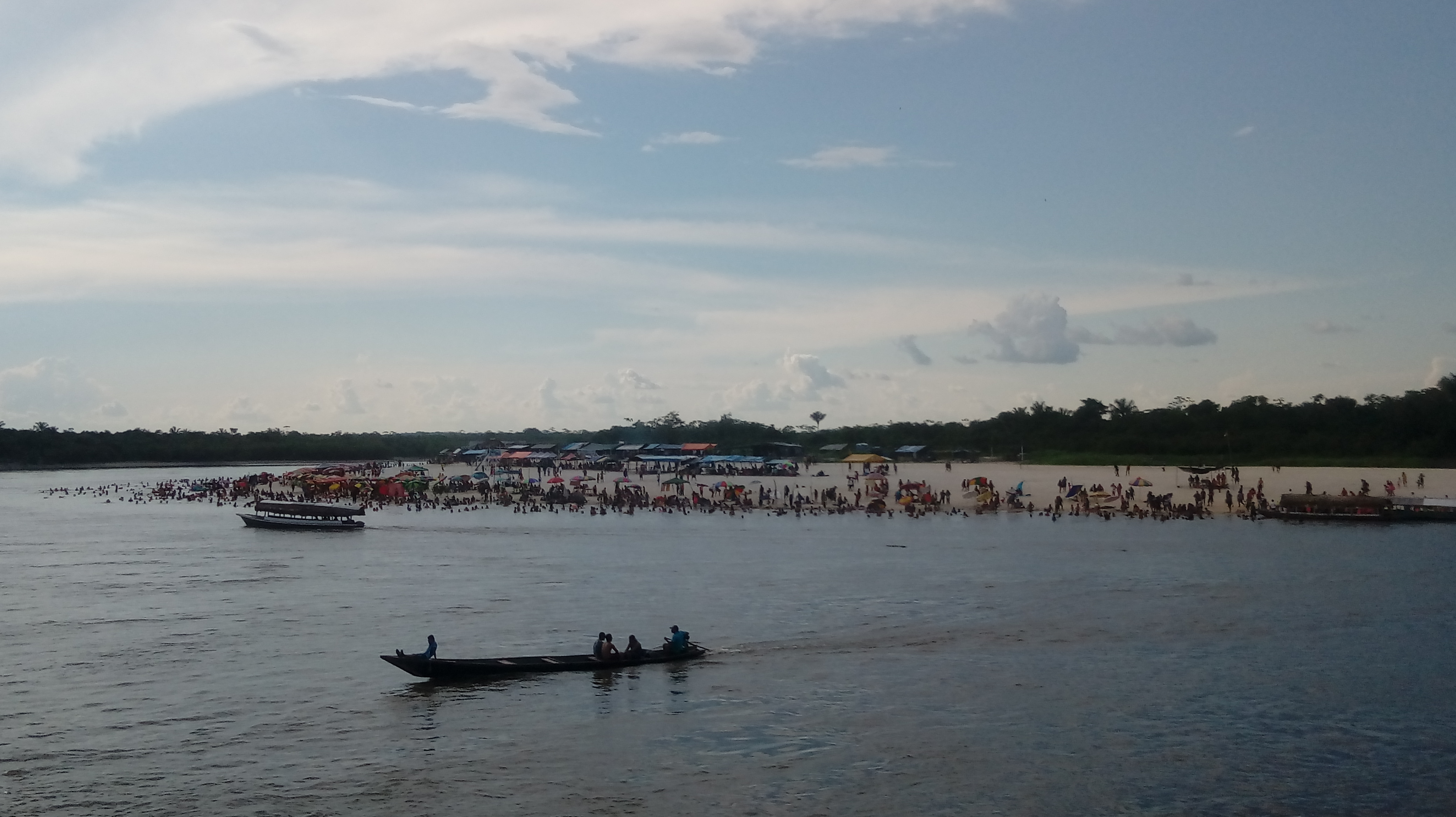 Playa de Pampachica (Iquitos) en el río Nanay durante el atardecer.